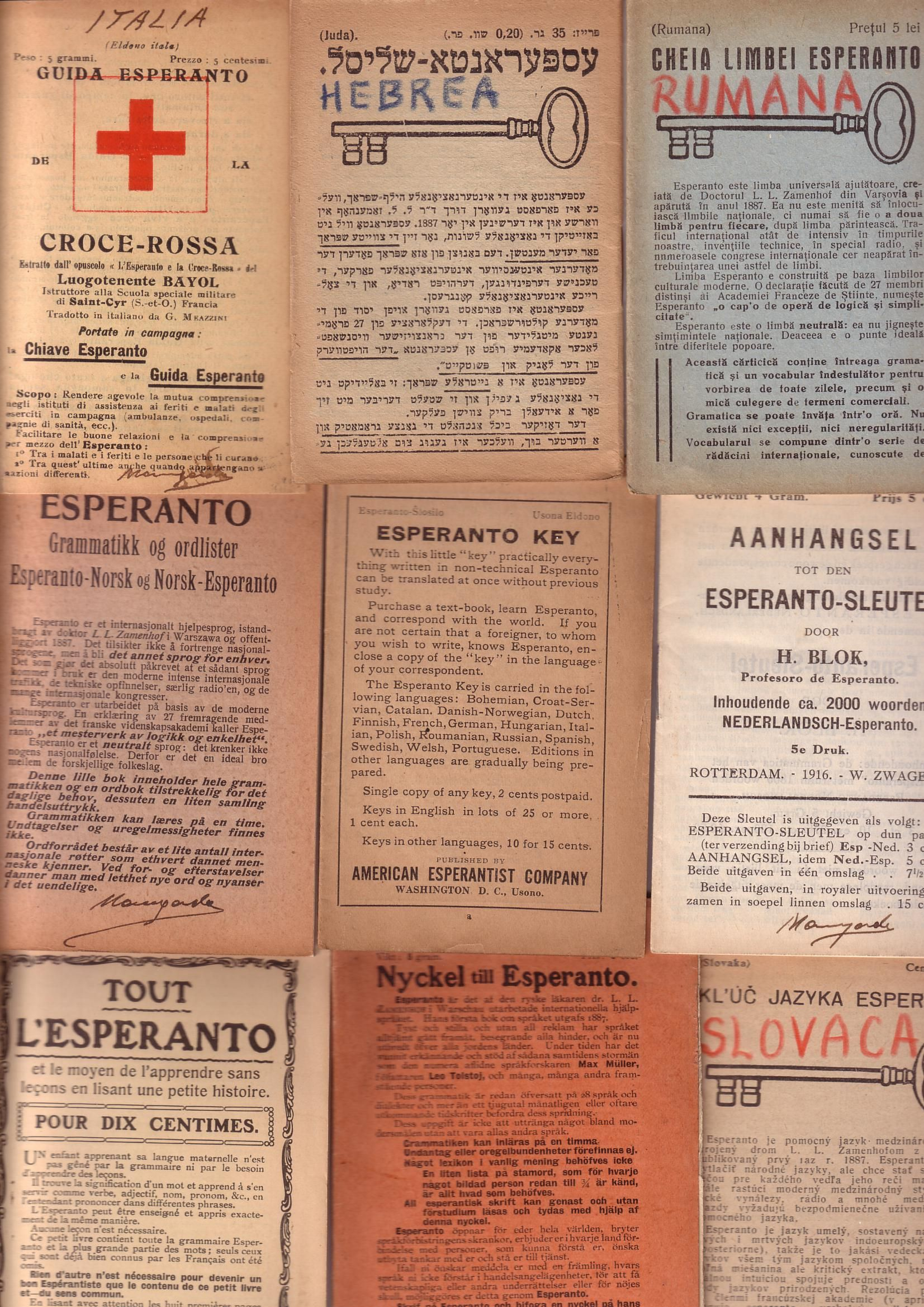 Gvidlibroj pri Esperanto